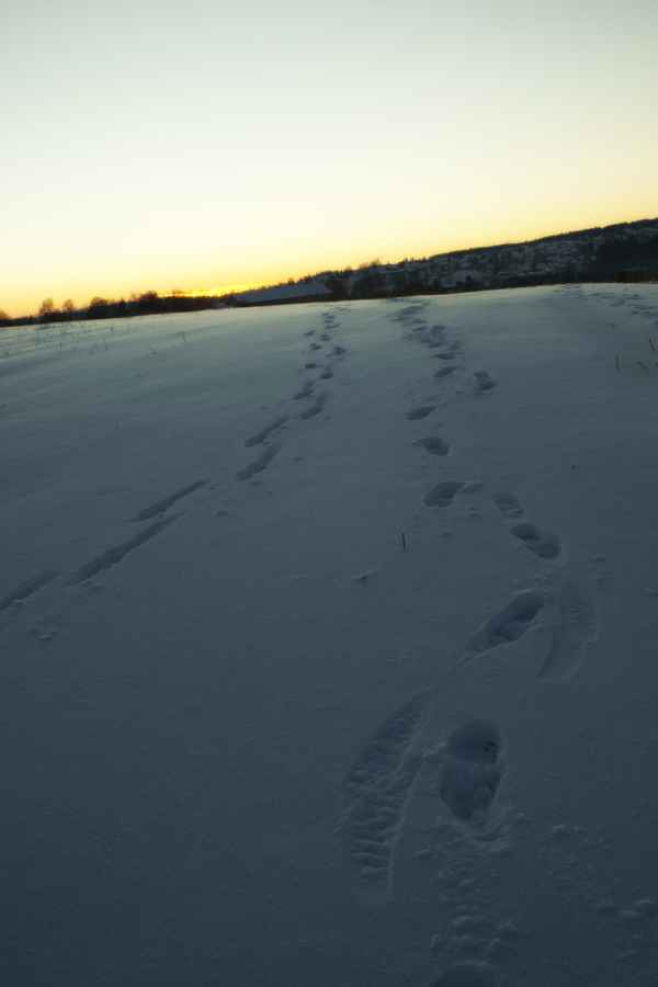 Fotspor over kornåker i snø